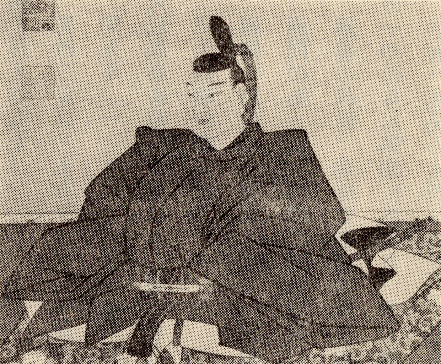 久留島通同の肖像(モノクロ)。